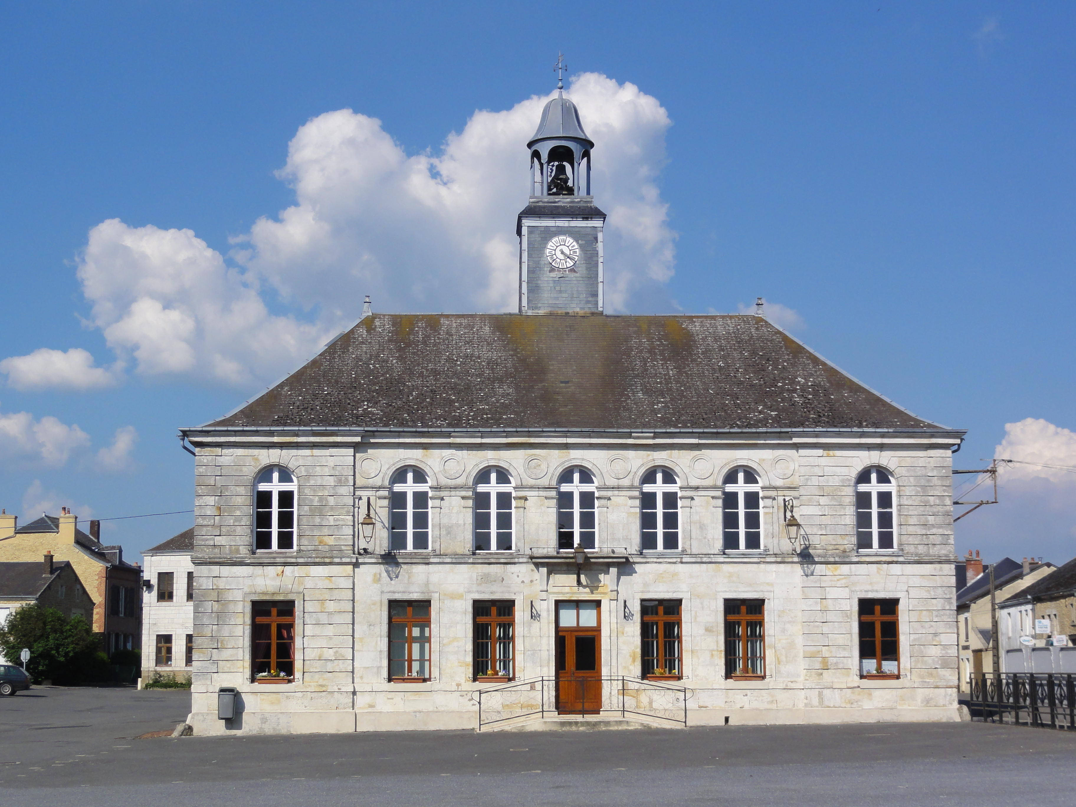 Auvillers-les-Forges (Ardennes) Mairie